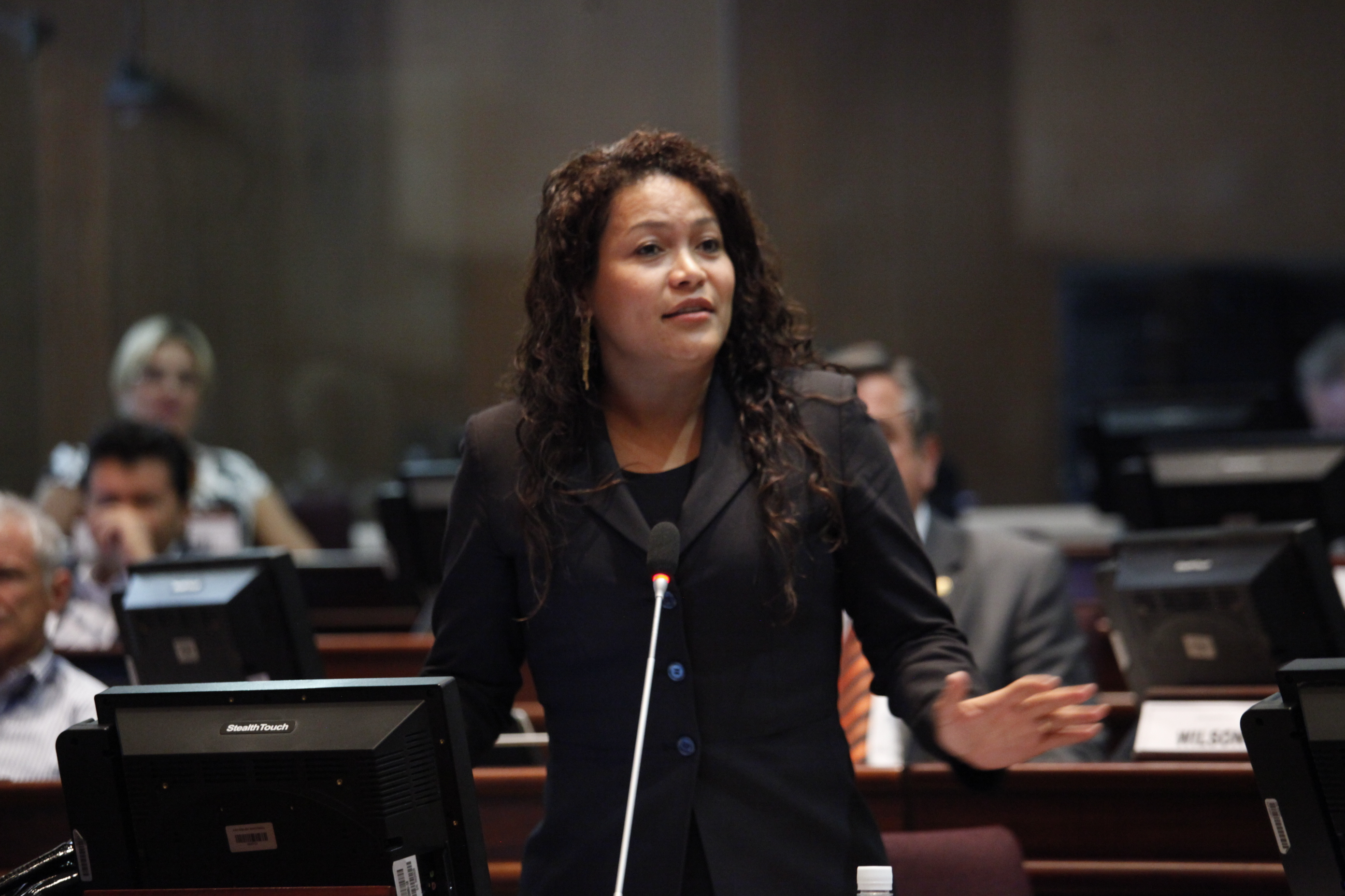 14 abril de 2015 Sesión 321 del Pleno de la Asamblea Nacional TEMA: Segundo Debate del Proyecto de Ley Orgánica para la Justicia Laboral y Reconocimiento del Trabajo en el Hogar. #LeyJusticiaLaboral Fotografía: Hugo Ortiz / Asamblea Nacional